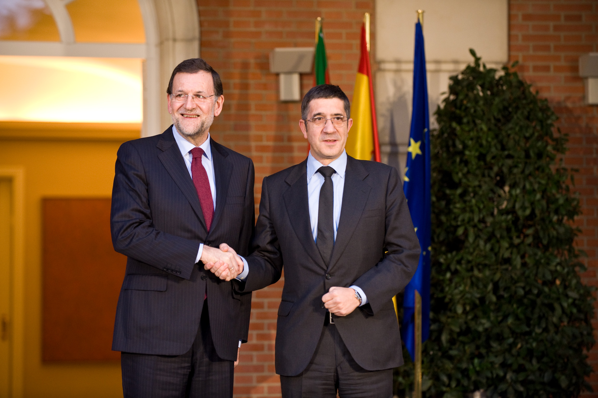 Encuentro entre el Lehendakari y Mariano Rajoy (3)